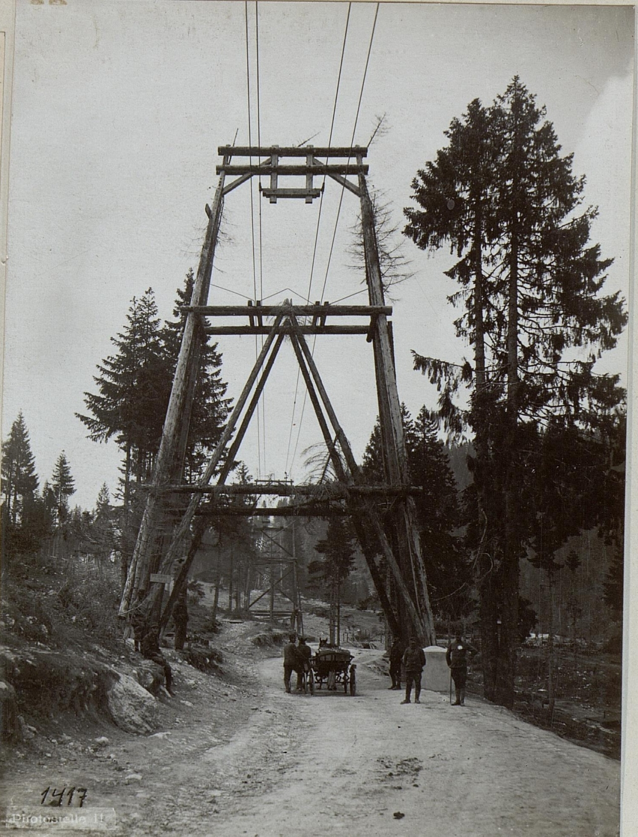 Seilbahn Nr: 10. Stütze bei der Straßenkreuzung Pusterle.